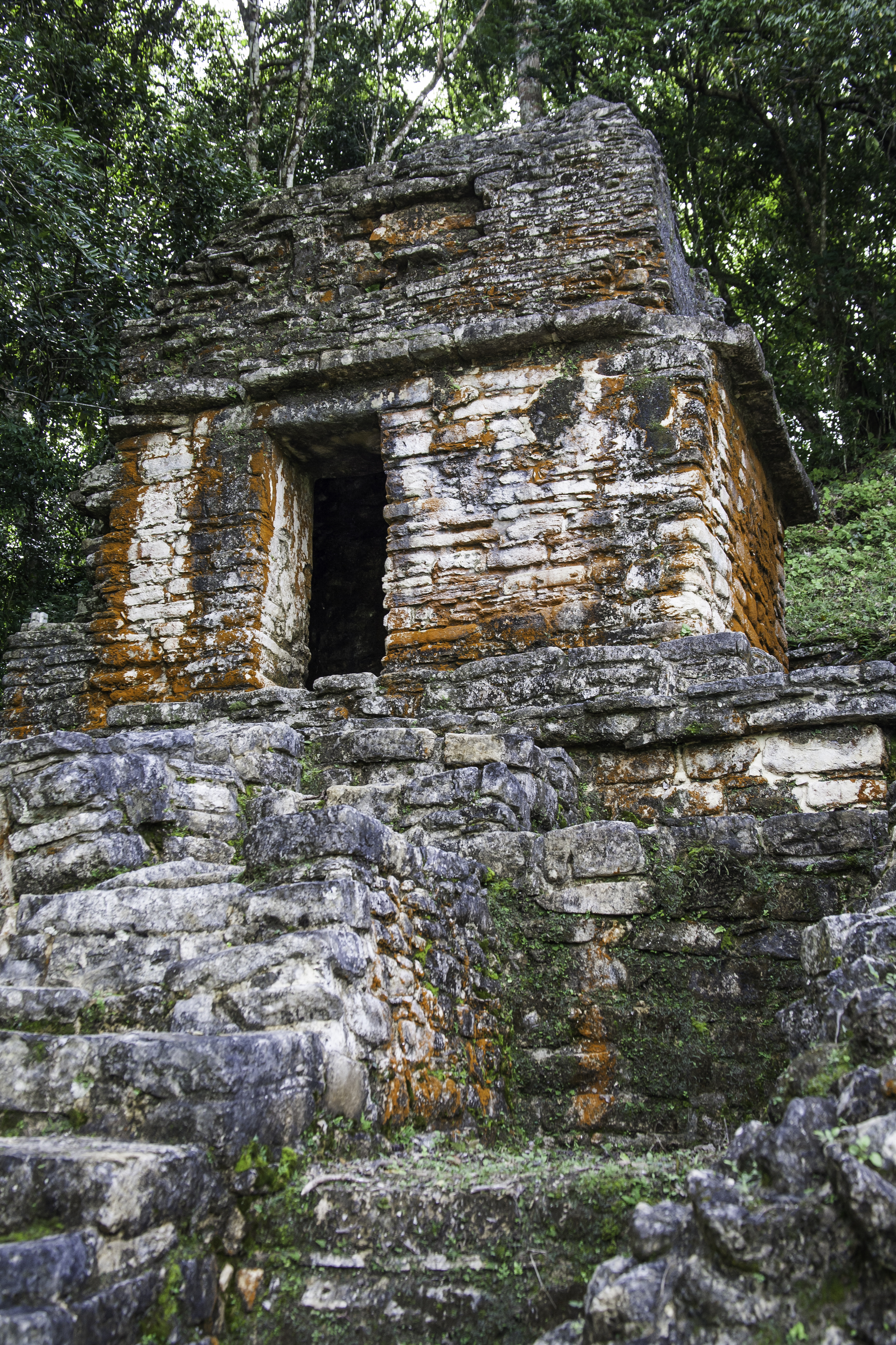 Bonampak